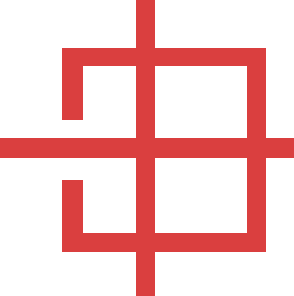 Княжыч - малады месяц які расьце. Княжыч - лагатып гістторыка-культурніцкага кюба "княжыч"